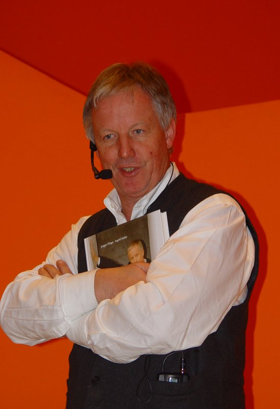 Jürgen Fliege bei einer Buchpräsentation in Ulm